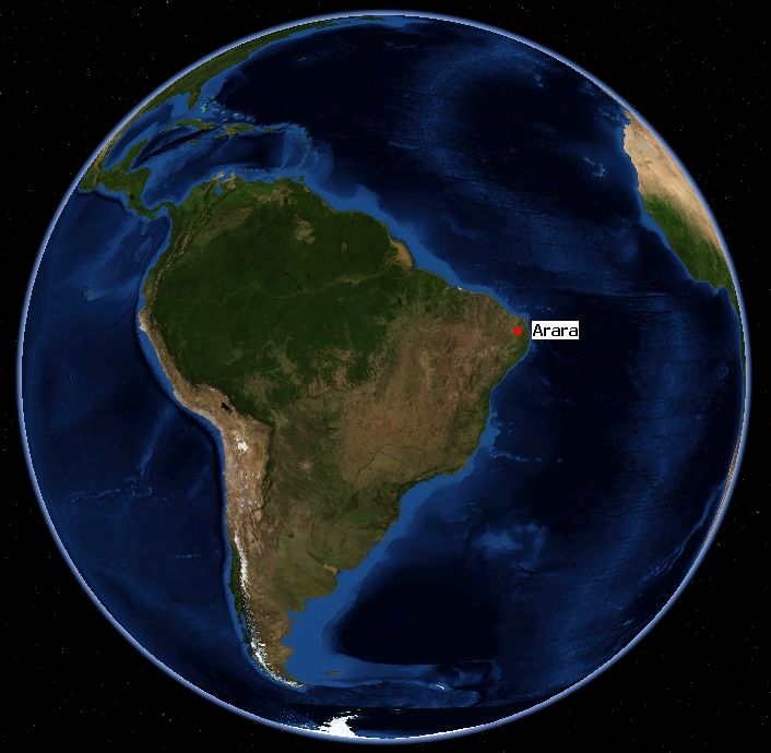 Localização da cidade de Arara, no mundo.